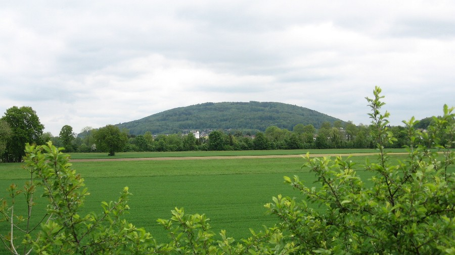 Born von Westen über der Kirche von Gunzgen